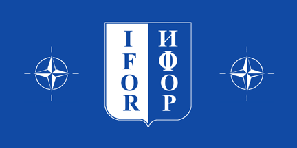 емблема на IFOR